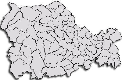 Categorie:Hărţi ale judeţului Neamţ